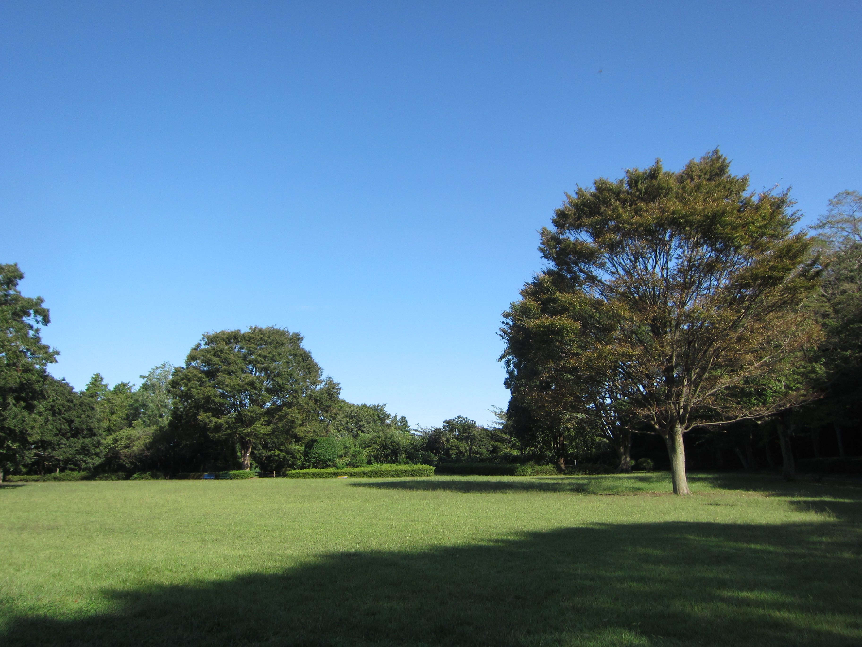 芹沢公園の芝生広場